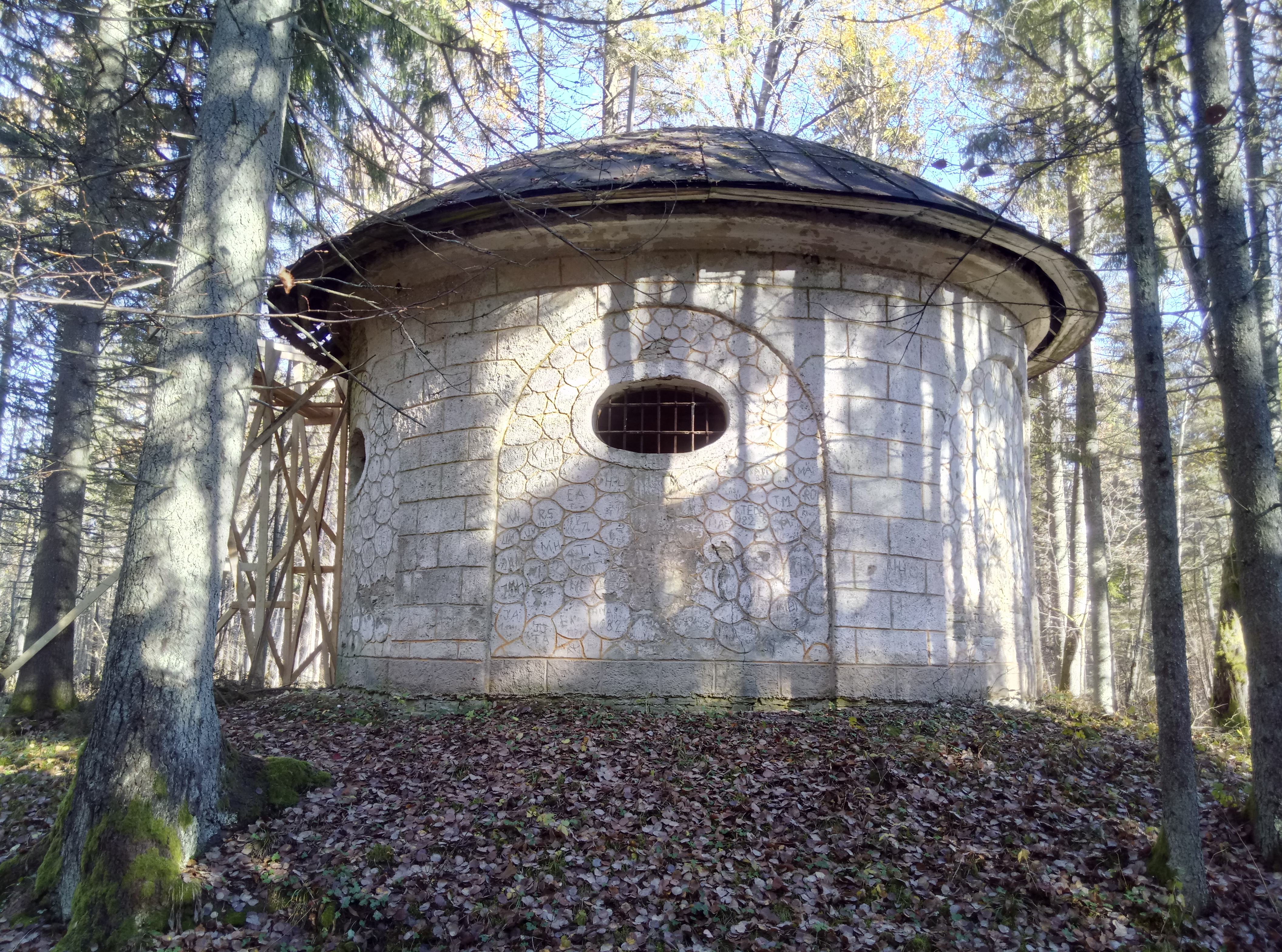 Järvakandi mõisa kalmistu kabeli läänevaade